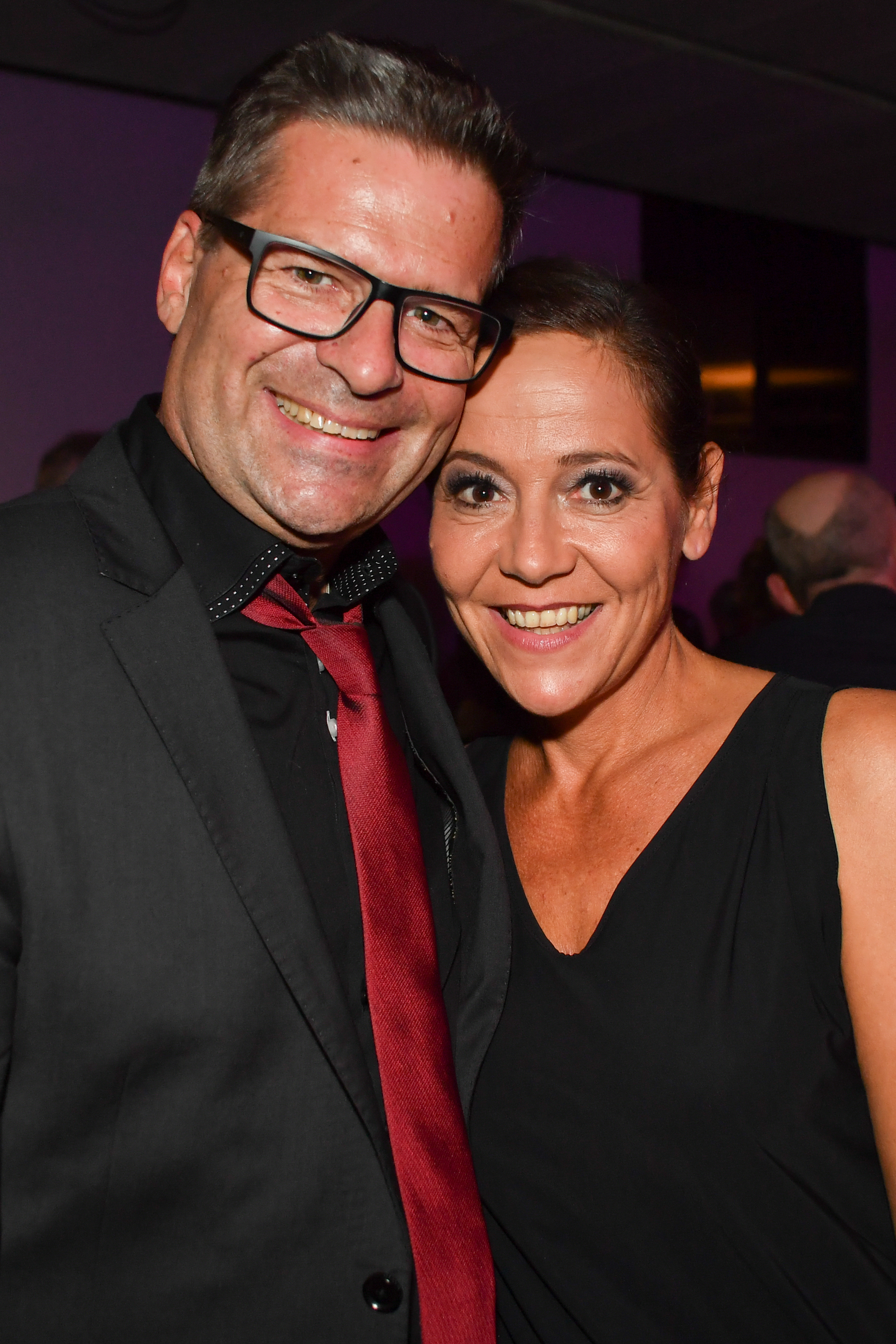 ORF Dancing Stars am 7. April 2017 in Wien. Bild zeigt Gerold Rudle und Monica Weinzettl.